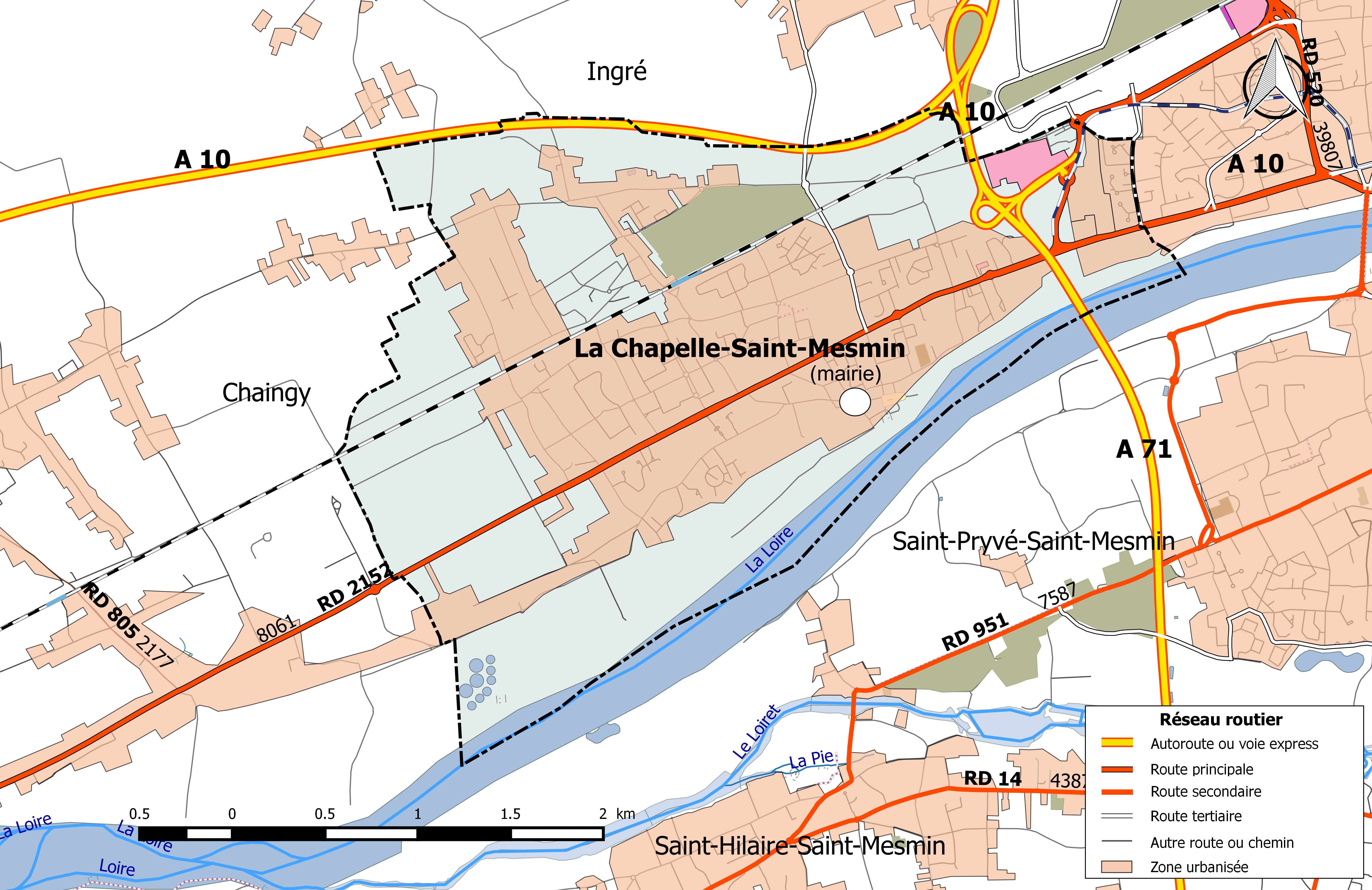 Carte du réseau routier de la commune de La Chapelle-Saint-Mesmin.